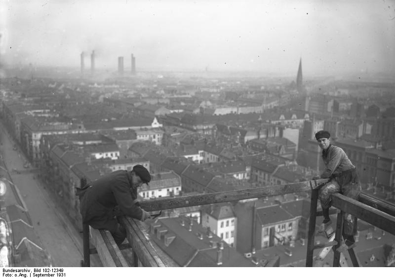 Zwischen Himmel und Erde! Gefahrvolle Arbeiten von Gerüstbauern in 70 m Höhe über dem Häusermeer Berlins.